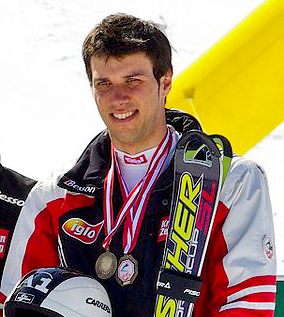 Mario Matt (1979), Austrian alpine skier